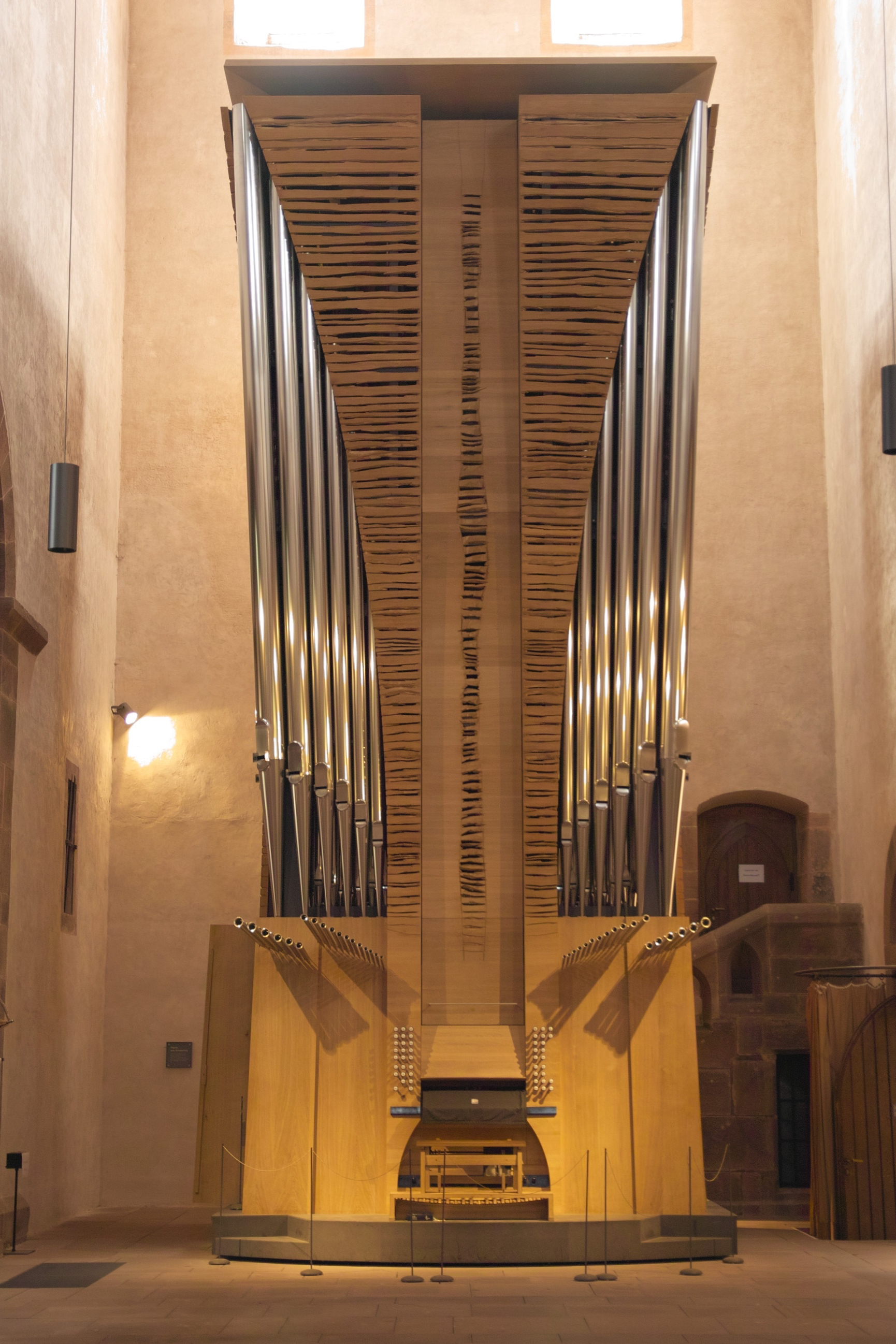 Bei besonderen Konzerten wird die Orgel auf Luftkissen aus dem Querschiff in das Längsschiff gefahren. Hier ist die Akustik optimal.